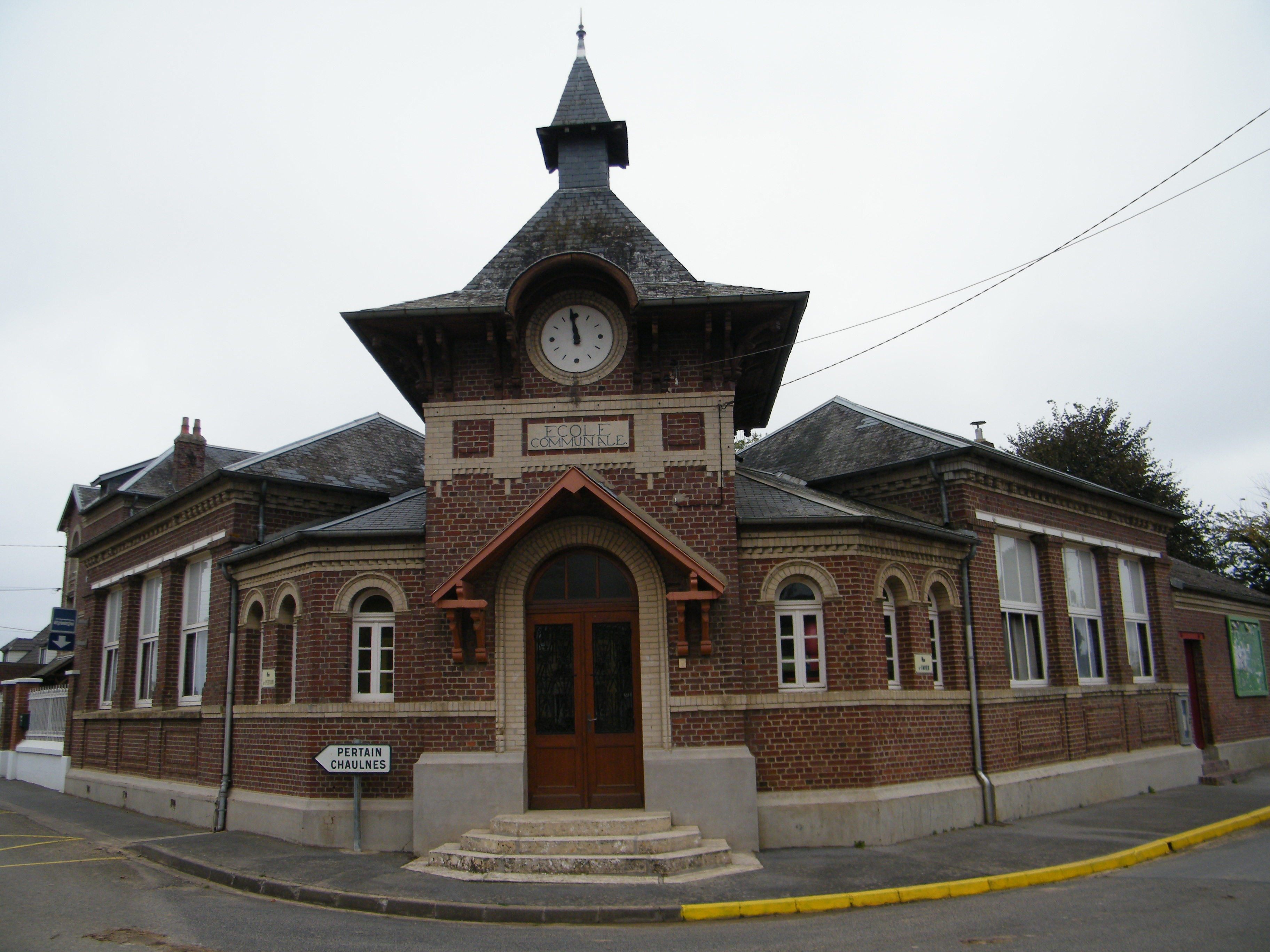 Mairie.